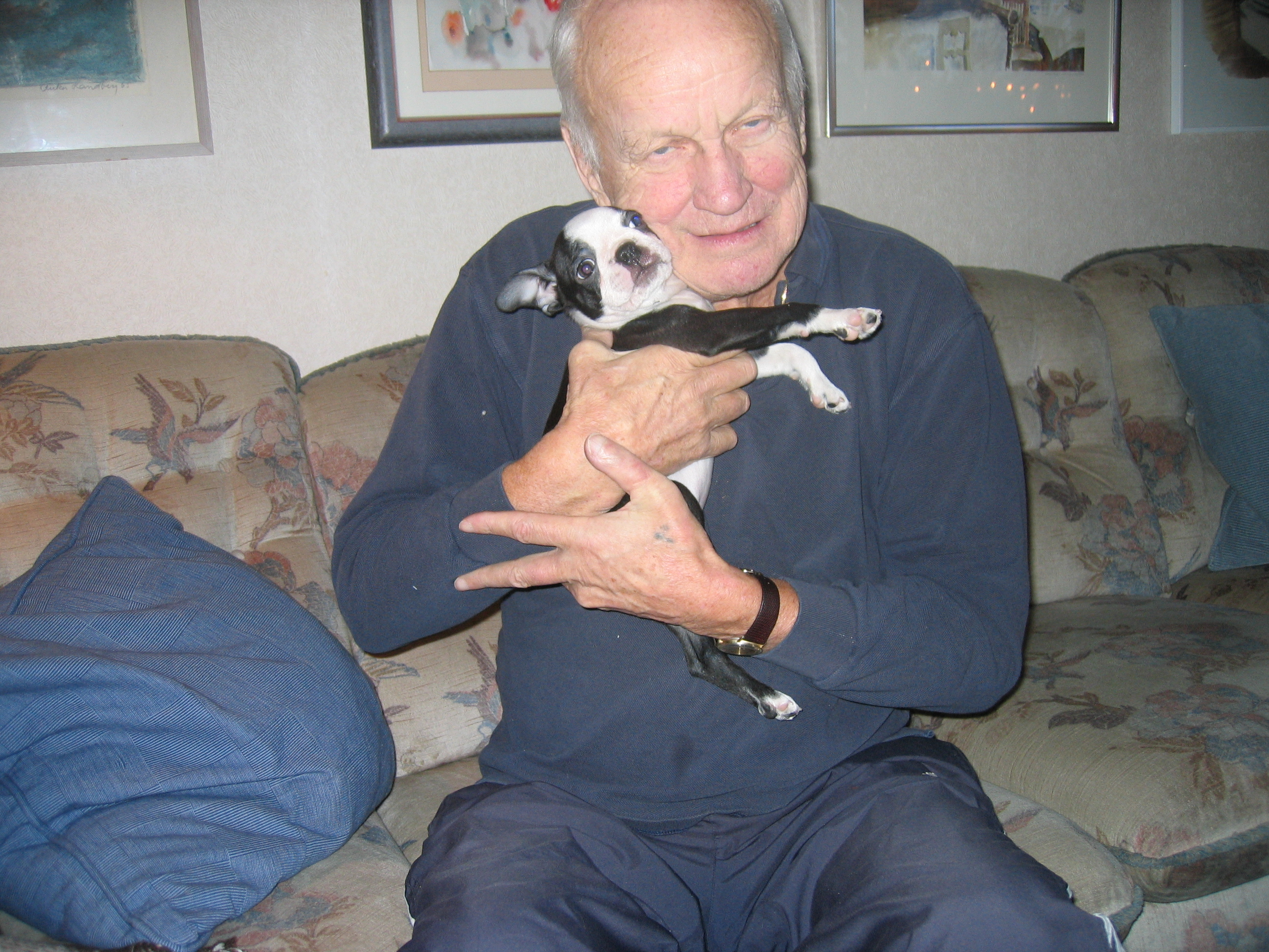 Foto av Rolf Holmström och hans Boston terrier Wilma.